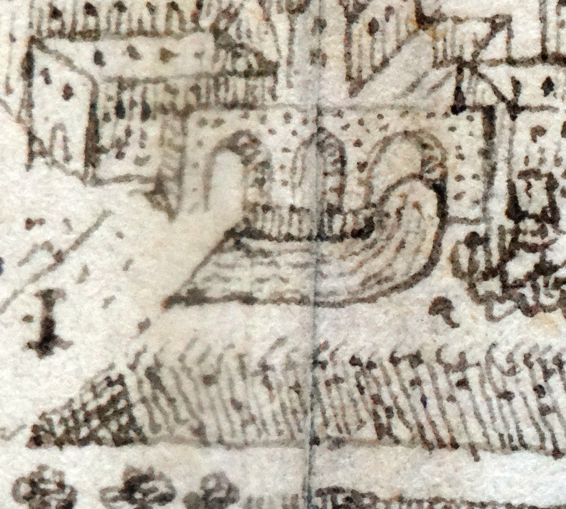 Eisbacheinlass in die innere Stadtmauer von Worms. Detail aus: Peter Hamman: Ansicht der Stadt Worms nach der Zerstörung 1689 von Süden. Stadtarchiv Worms, Abt. 1B, Nr. 48.